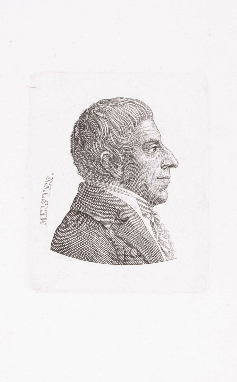 Scan eines Kupferstiches von Ernst Ludwig Riepenhausen in der Herzog-August Bibliothek Wolfenbüttel